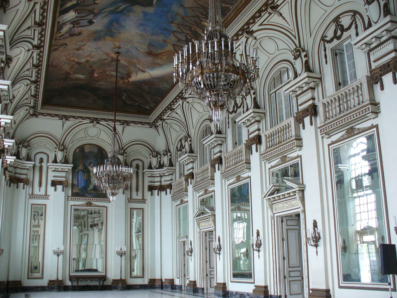 Sem querer comparar, assim como o palácio de Versailles na França, o Museu da Revolução em Havana também tem sua sala dos espelhos.